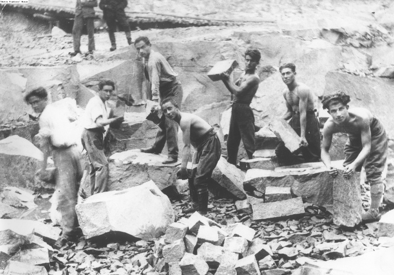 חברי תנועת החלוץ מפלוגת חוצבי האבנים בקלוסובה בעבודתם במחצבה